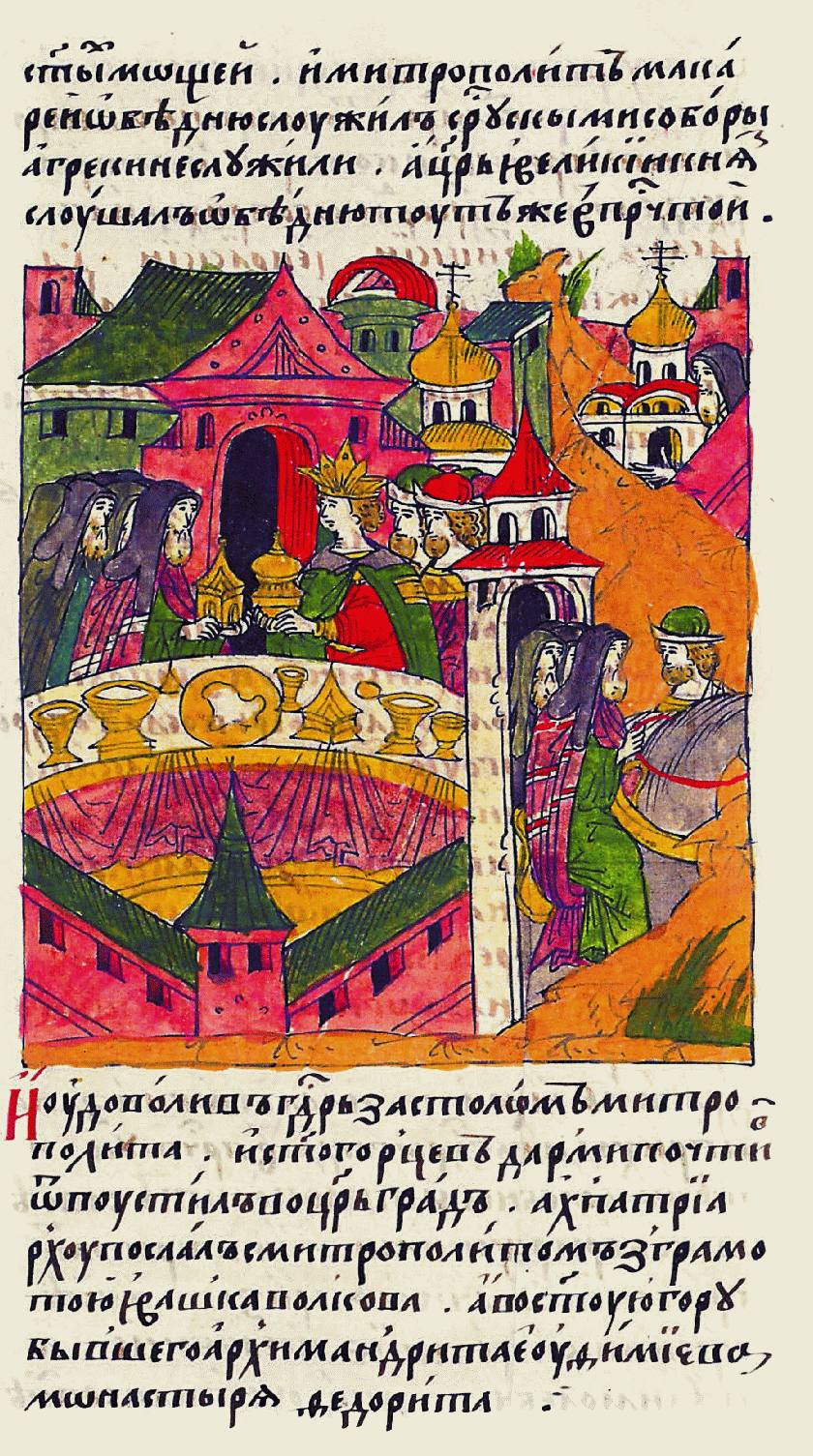 Лицевой летописный свод "И почтил государь за столом митрополита и святогорцев дарами, отпустил их в Царь град, а к патриарху послал вместе с митрополитом Ивашку Волкова с грамотой, а в Святую гору послал бывшего архимандрита Евфимиева монастыря Феодорита".